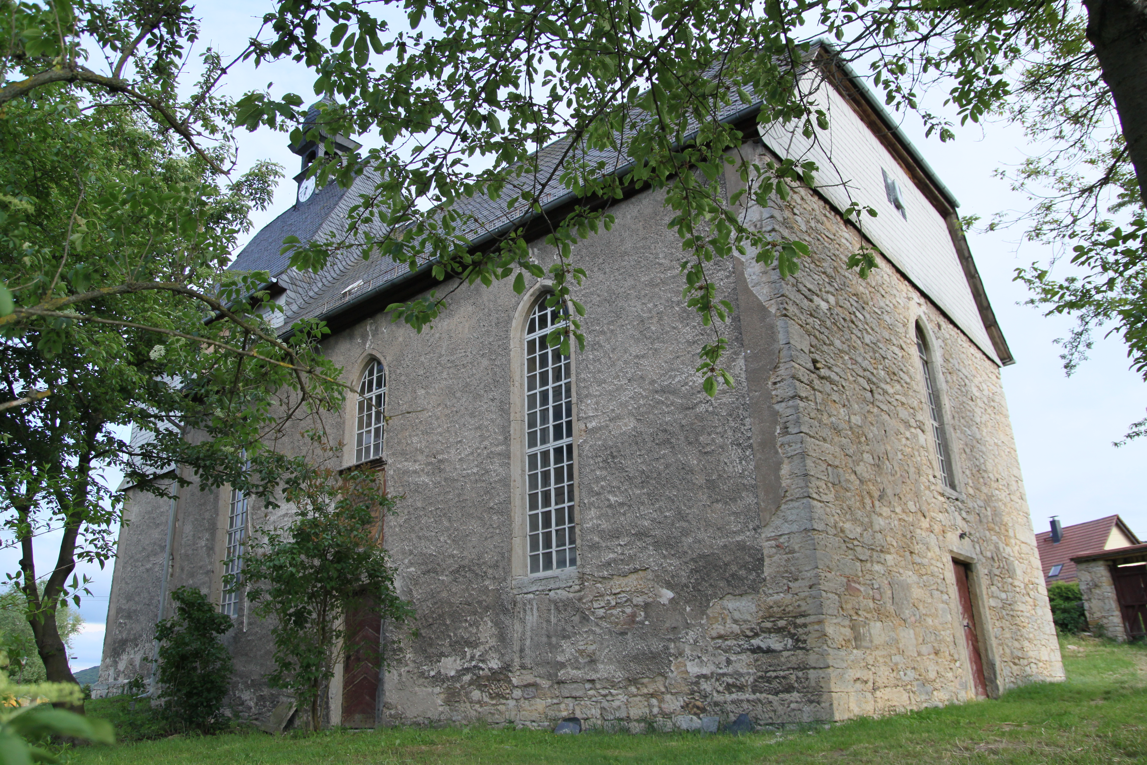 Dorfkirche in Golmdorf